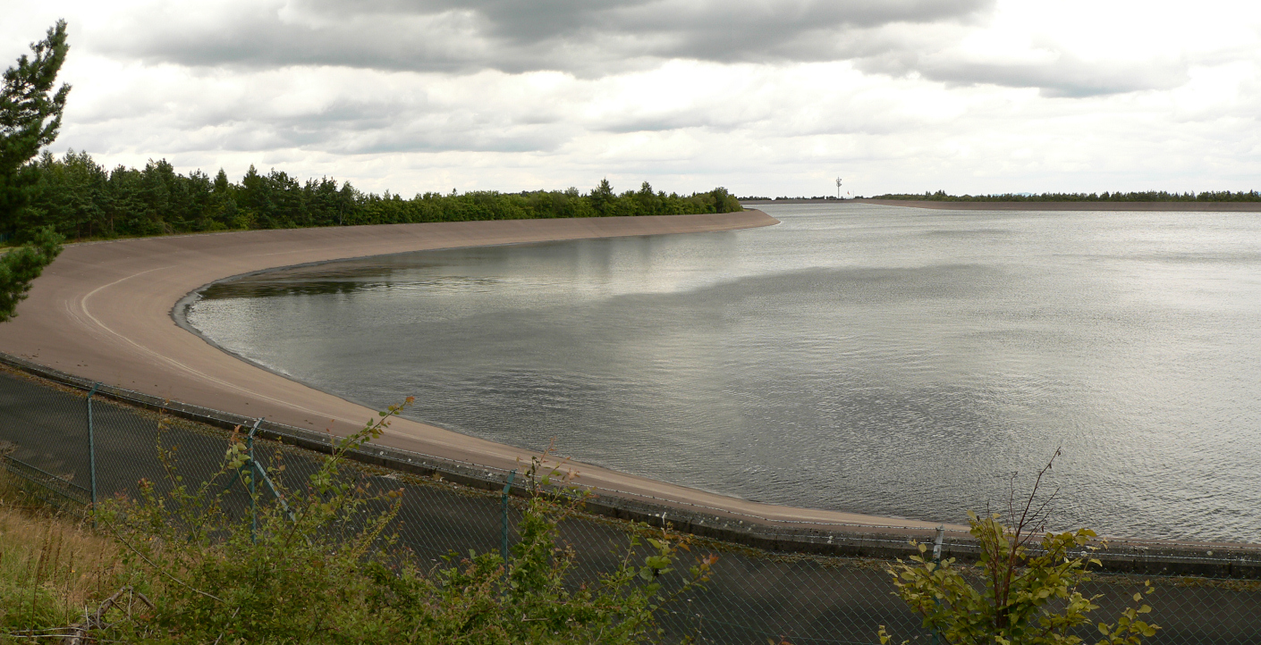 Oberbecken Waldeck II des Pumpspeicherkraftwerkes Waldeck